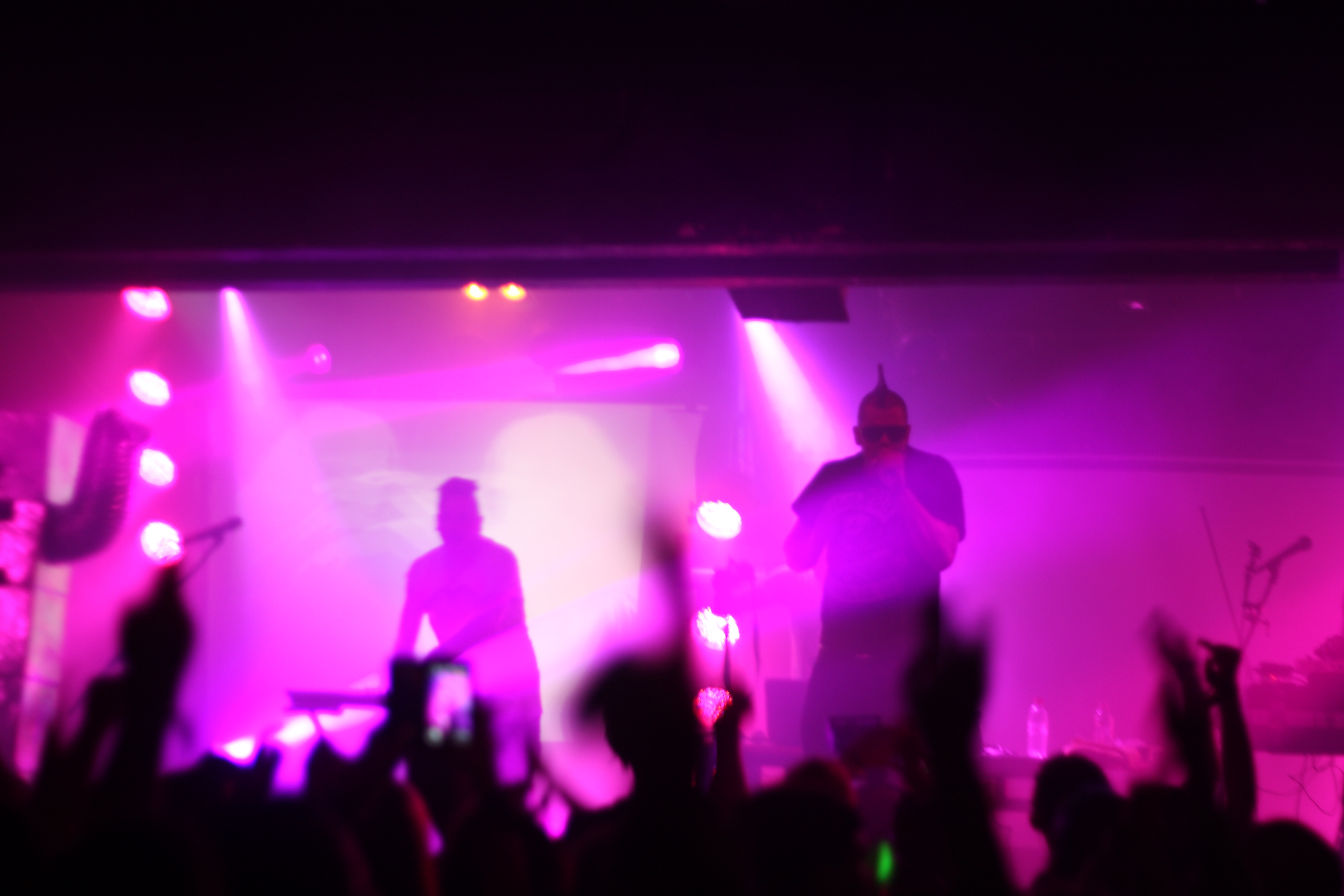 Modulate